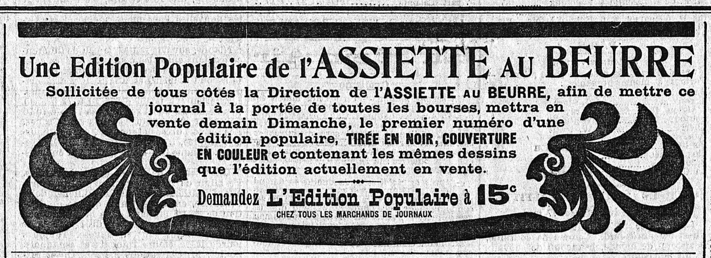 Publicité dans l'Echo de Paris